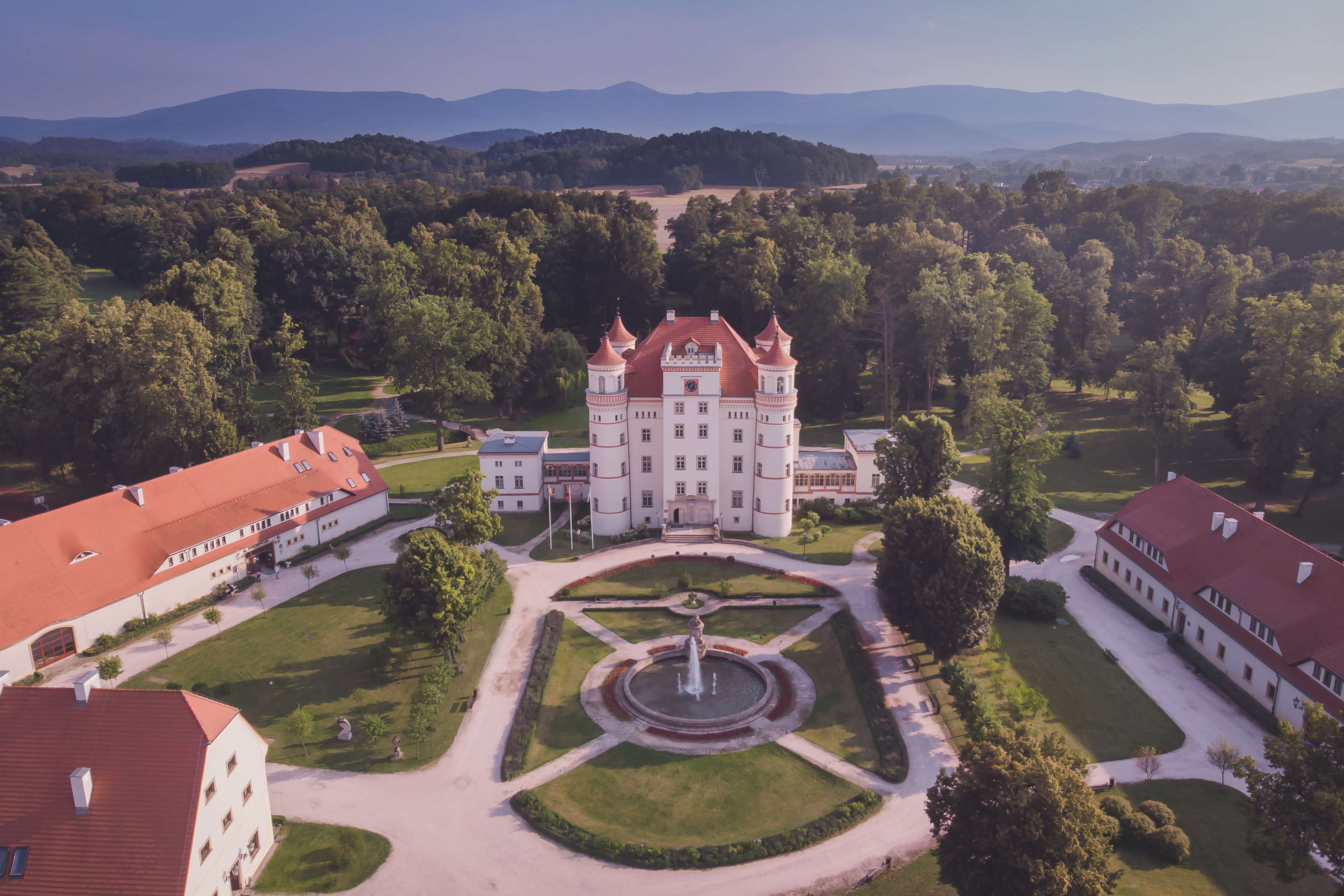 Wojanów, Pałac w Wojanowie Wikidata has entry Q11815054 with data related to this item.